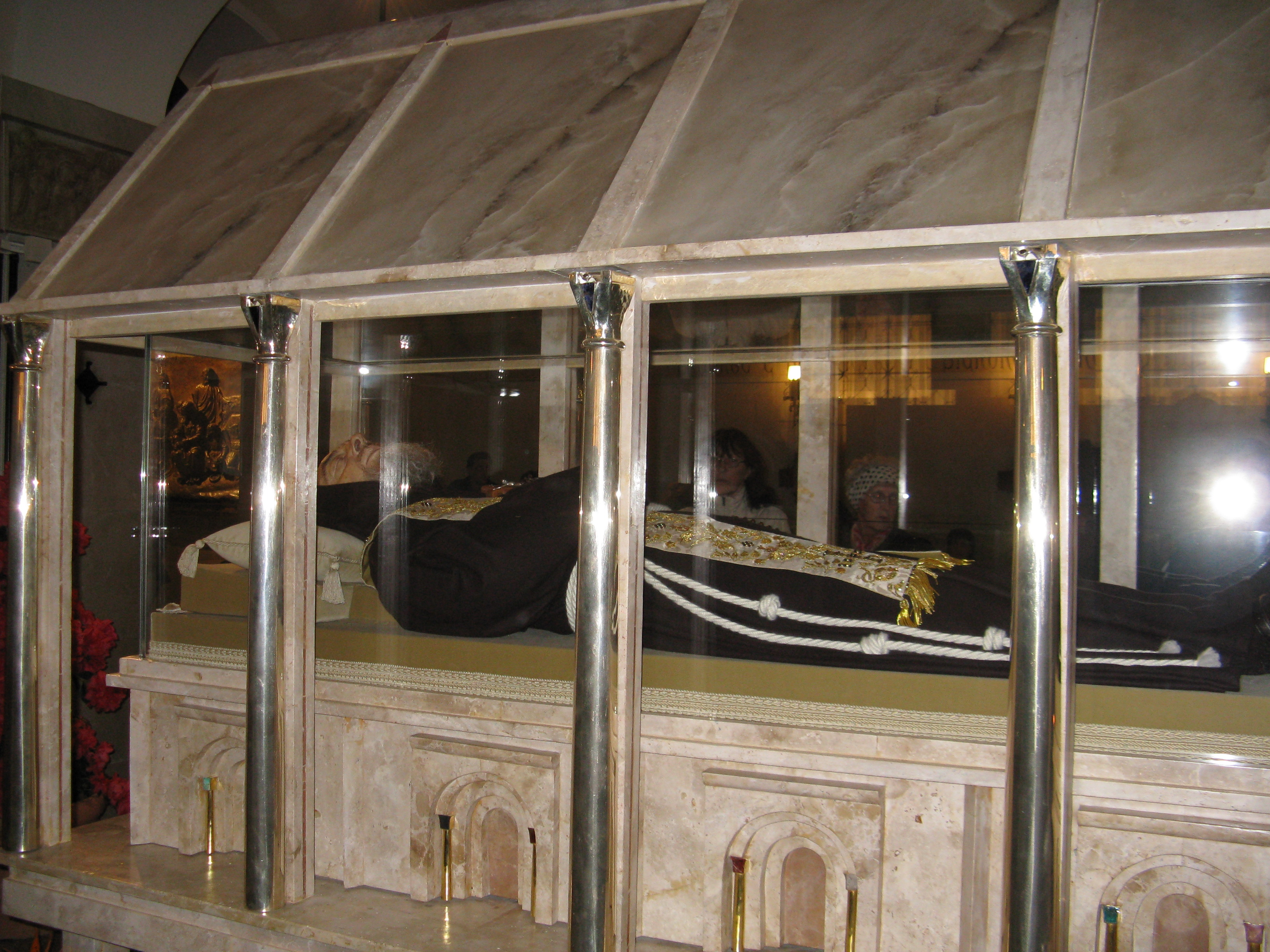 Scrigno contenente il corpo di San Pio